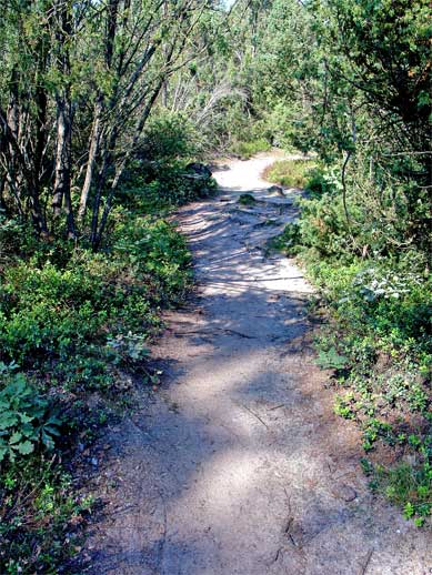 Noetselerberg (omgeving Nijverdal)